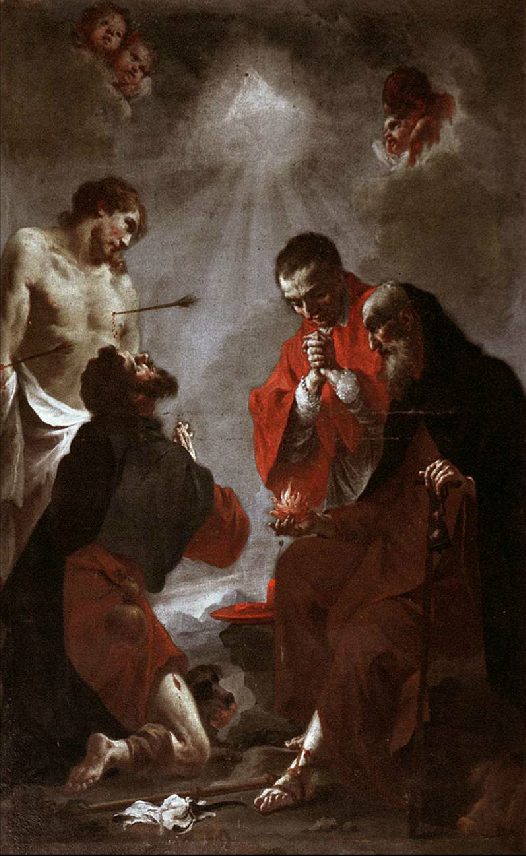 "Quattro Santi - San Sebastiano, San Rocco, San Carlo Borromeo e Sant'Antonio abate"